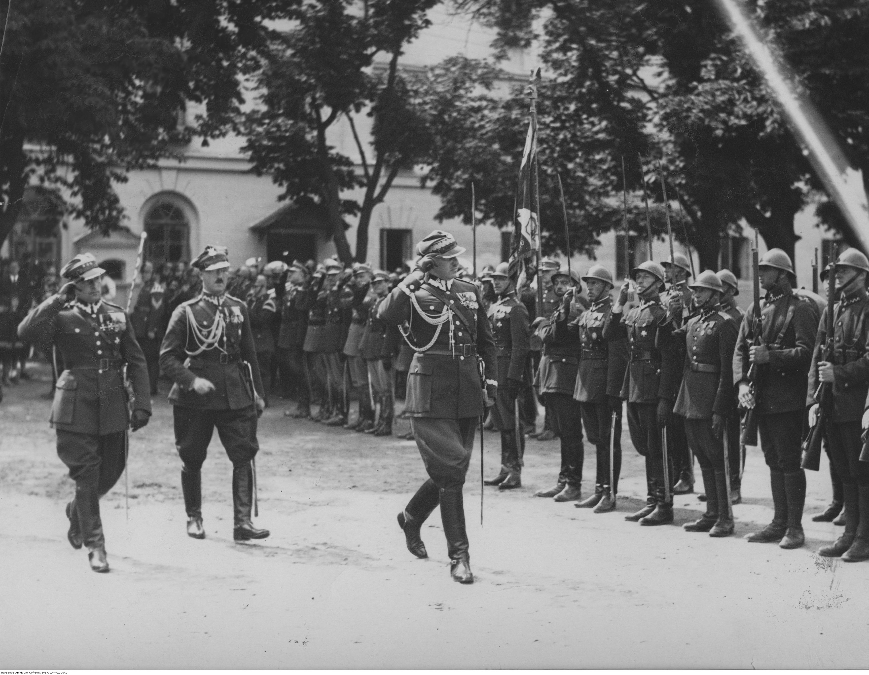 Święto 21 pułku piechoty w Warszawie - przegląd oddziałów przez gen. Antoniego Szyllinga (w środku); sierpień 1931. Koncern Ilustrowany Kurier Codzienny - Archiwum Ilustracji. Sygnatura: 1-W-1200-1